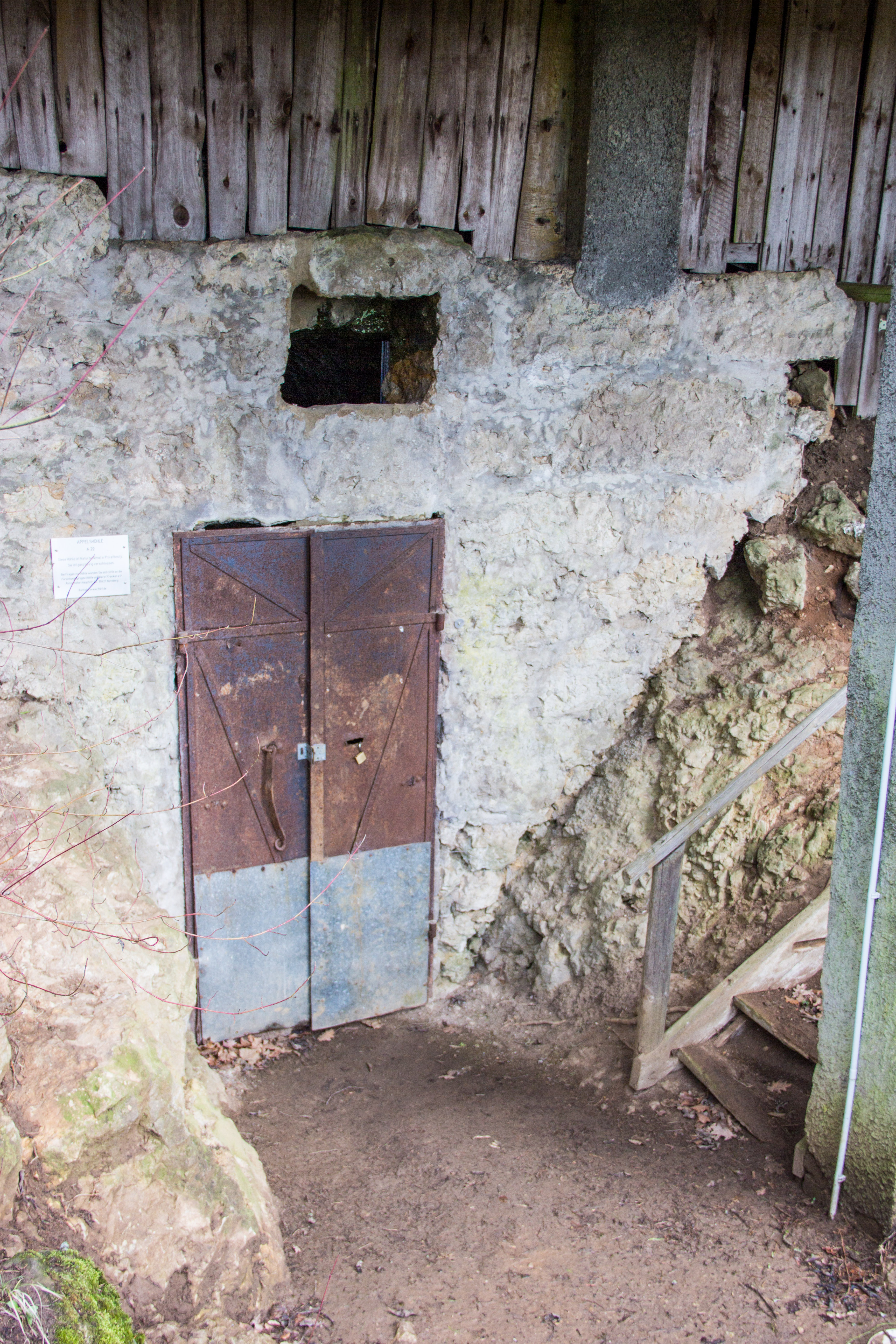 Applehöhle, Steinbach